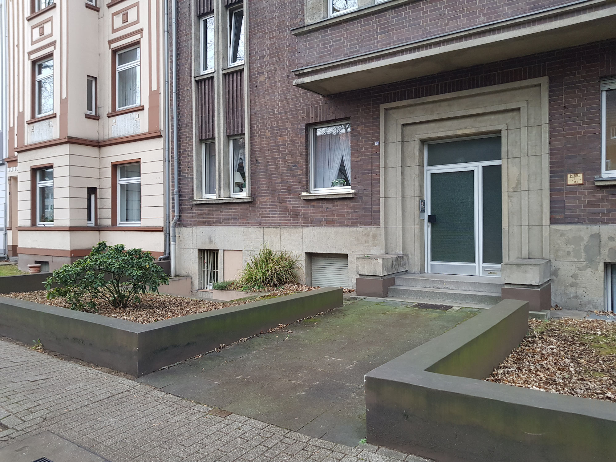 Stolpersteine Schweizer Str. 15, Duisburg-Duissern